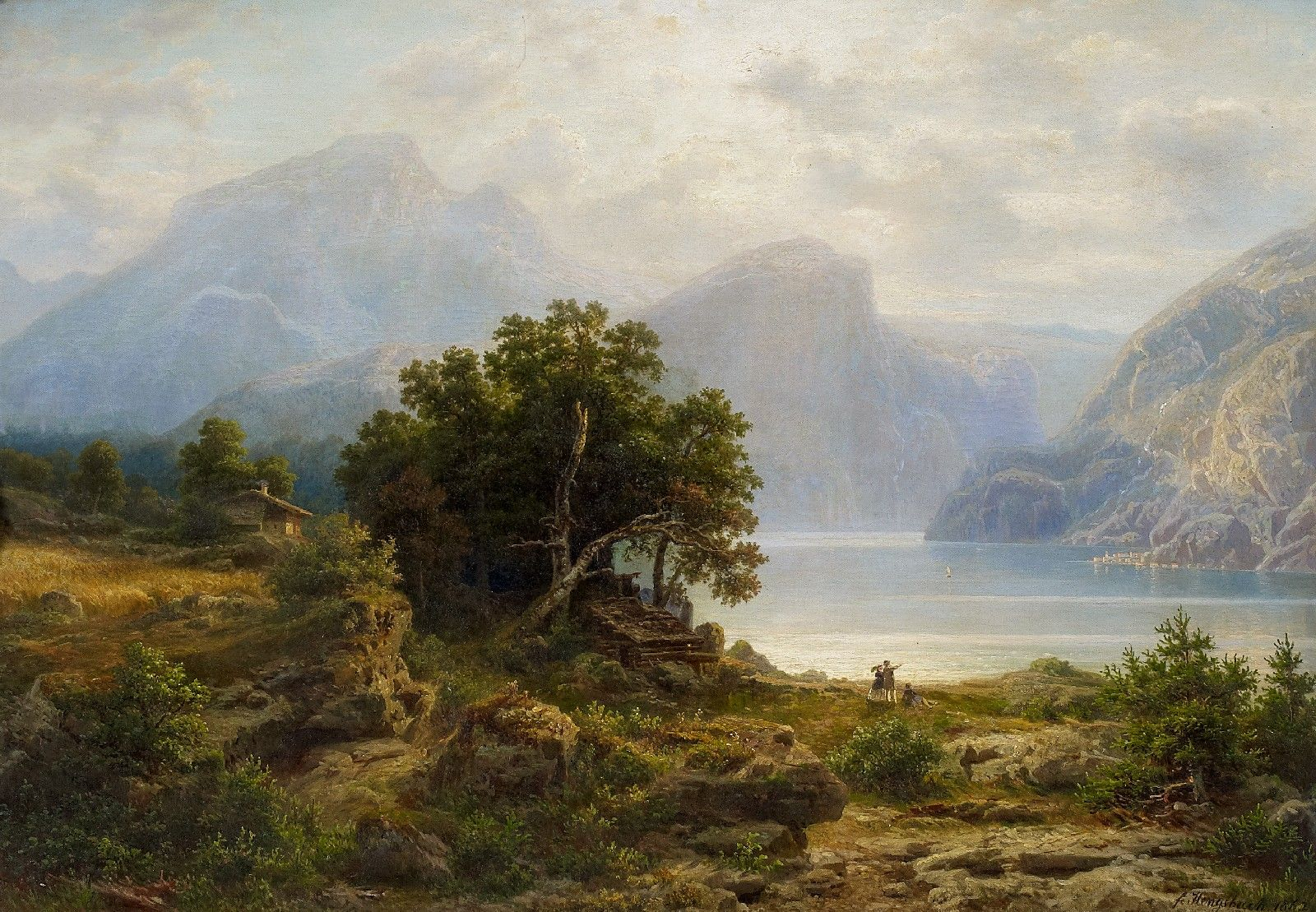 Der Achensee in Tirol. Signiert und datiert unten rechts: F. Hengsbach 1862. Öl auf Leinwand. 91,5 x 134 cm.